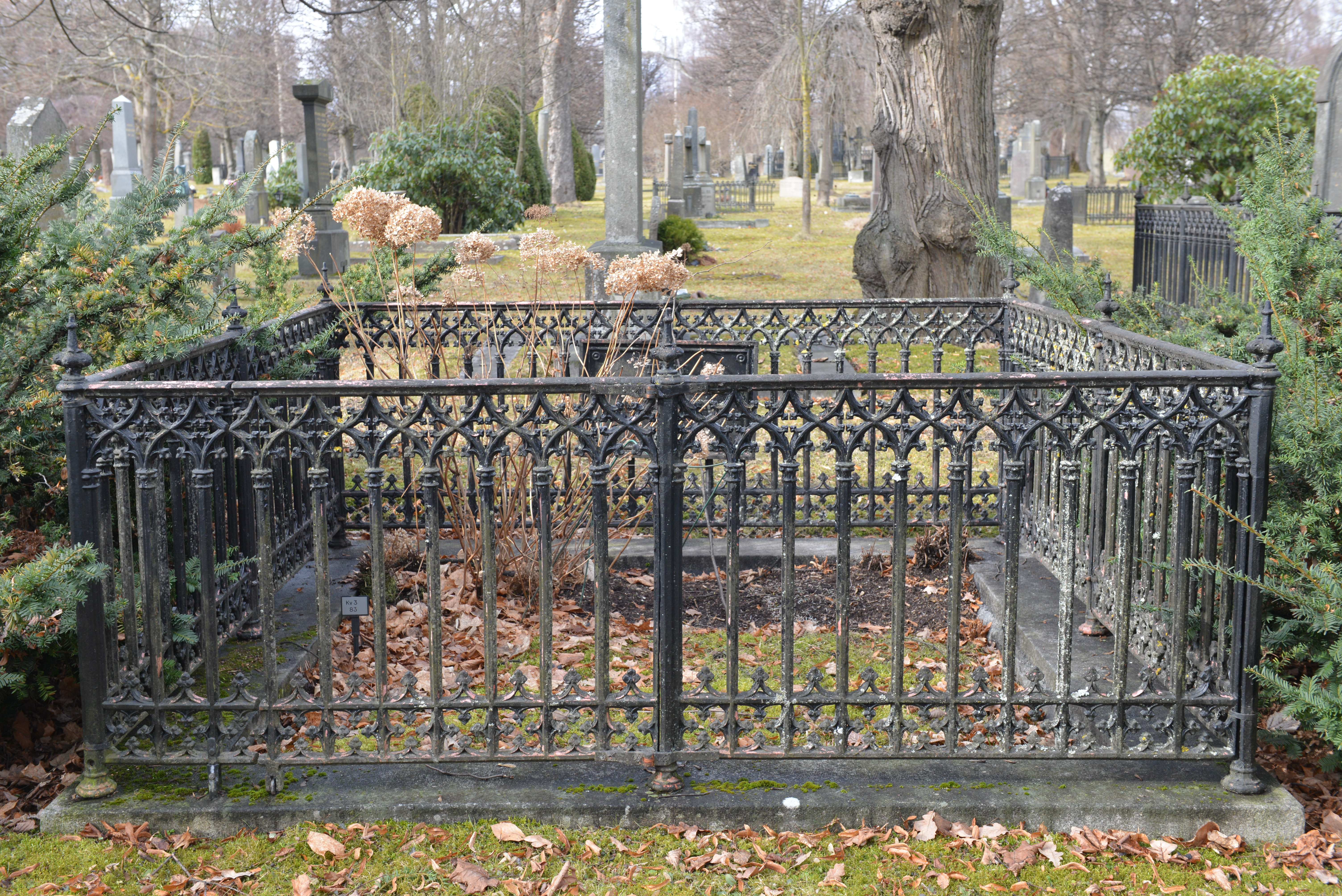 Lars Fredrik Blackstadius grav på Norra begravningsplatsen.